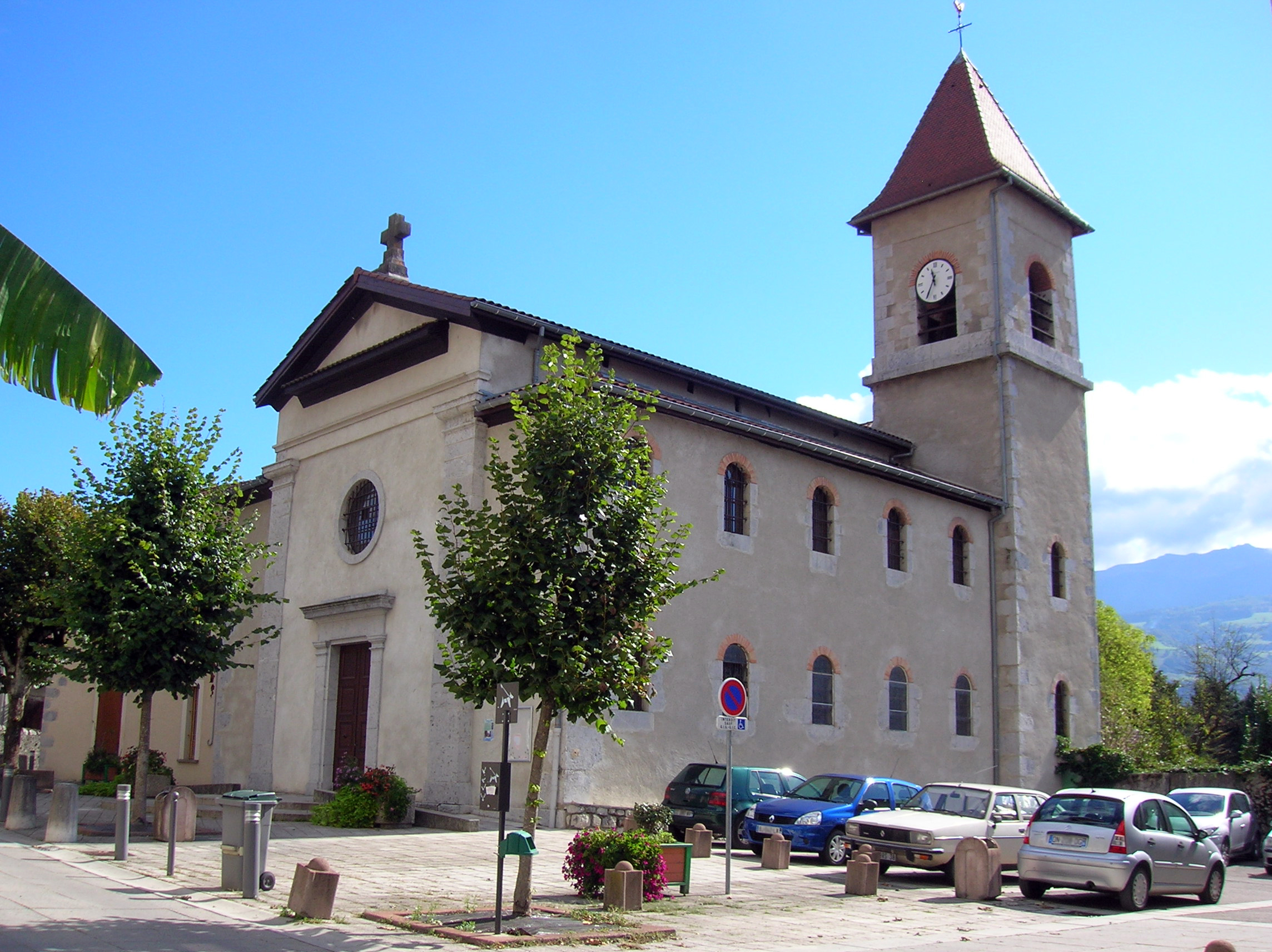 église. Lumbin un jour de Coupe Icare. Lumbin, Isère, France.